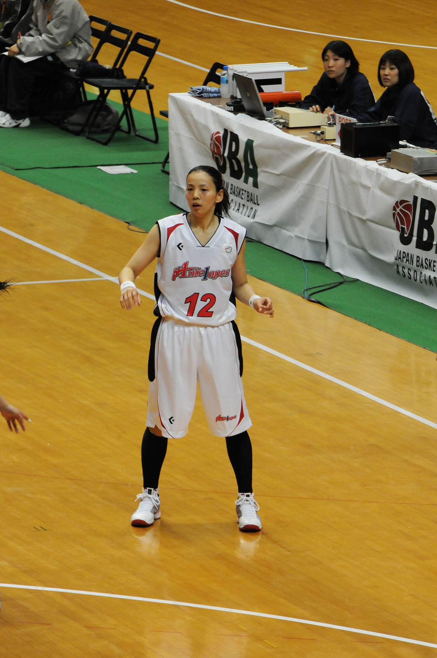 トヨタ自動車アンテロープス、矢野良子選手。東京体育館で。